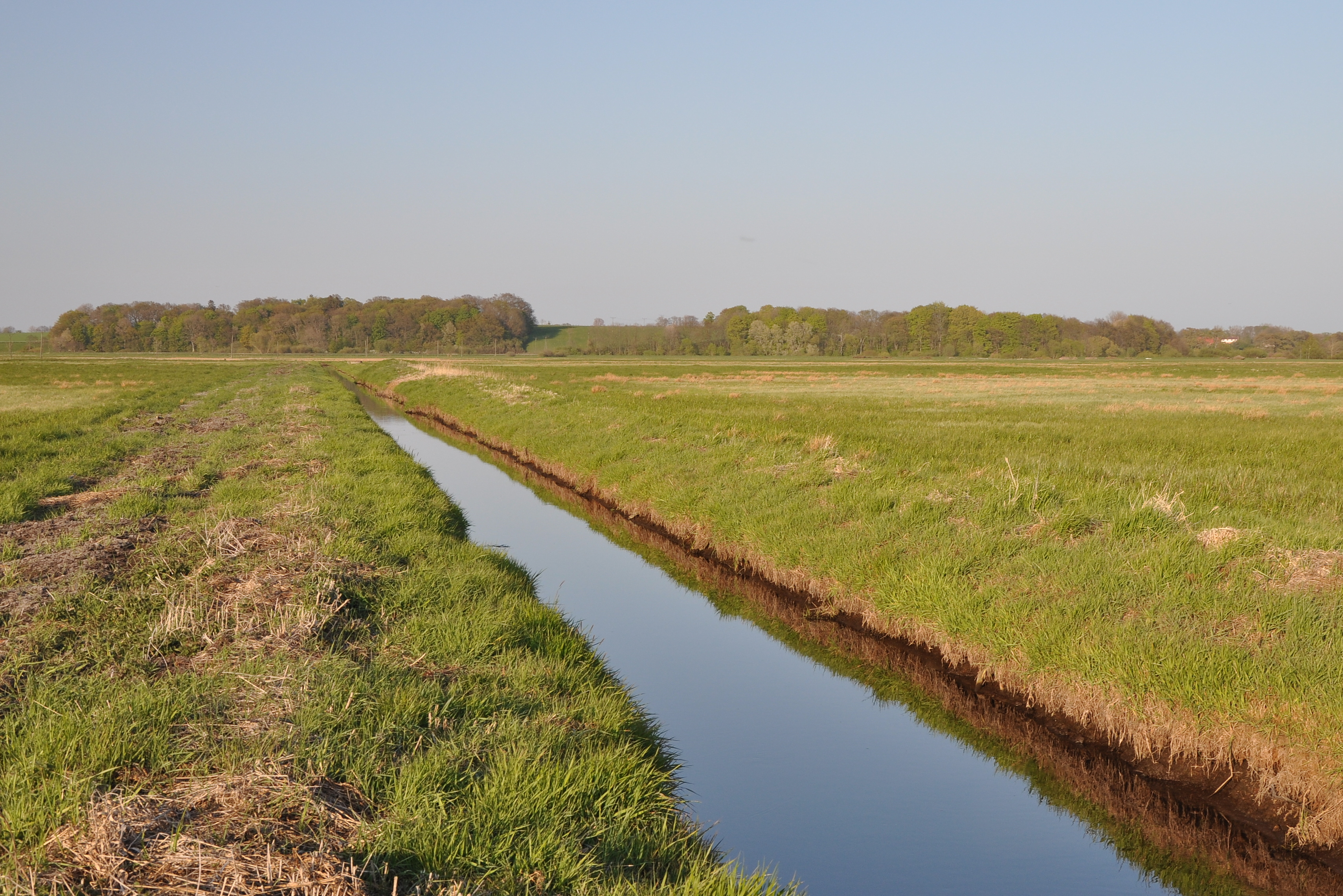 Stara Rega i Wydrza Góra (30,1 m n.p.m.), koło Włodarki